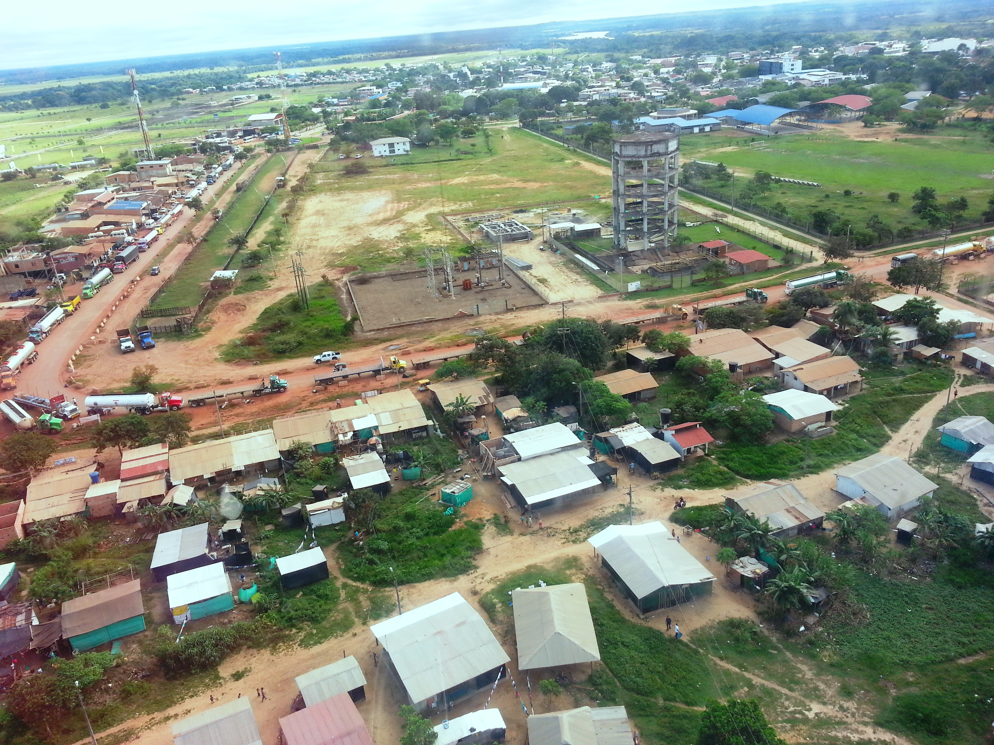 Puerto Gaitan, Meta